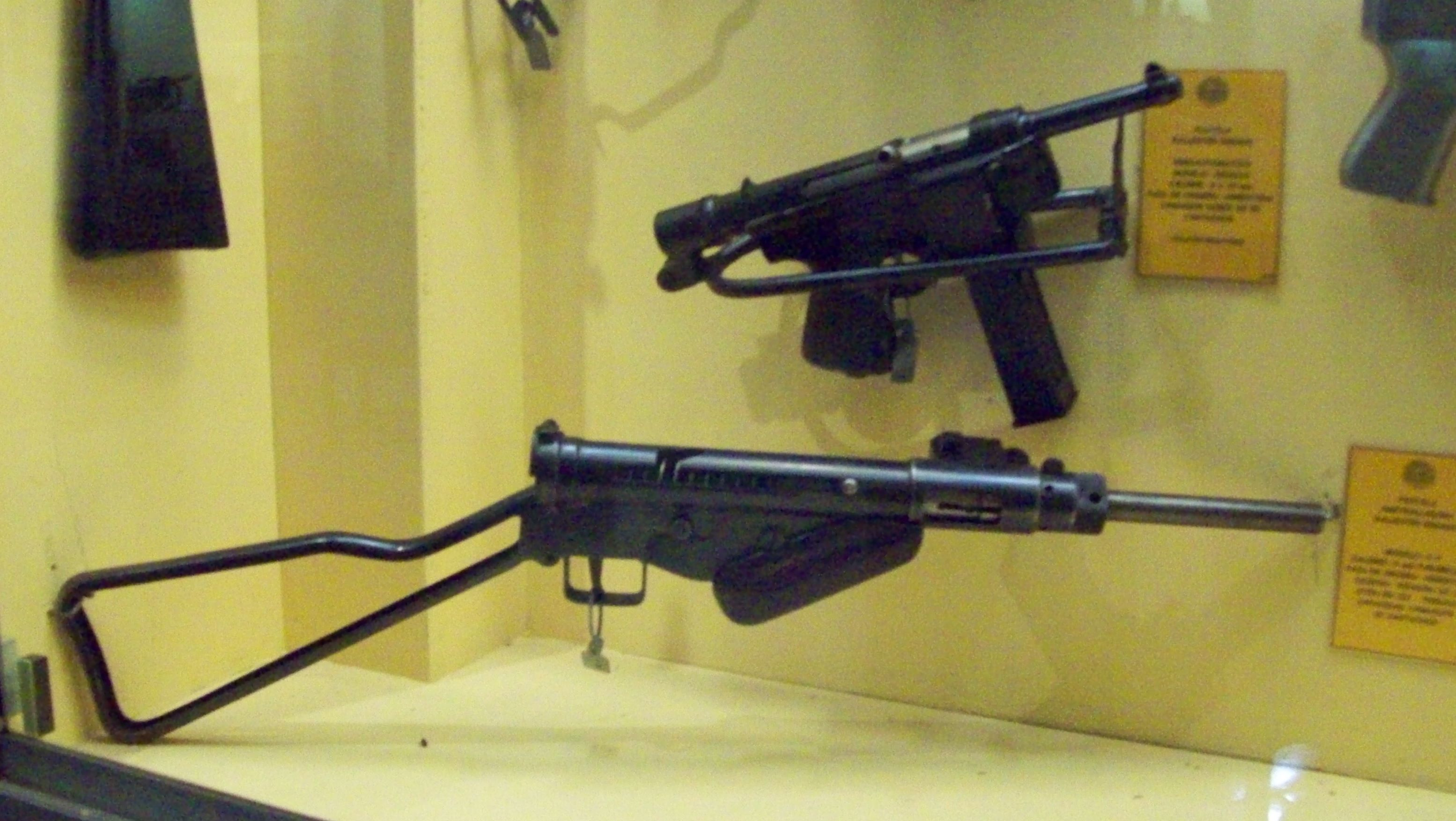 Armamento expuesto en el Museo de Armas de la Nación, ciudad de Buenos Aires, Argentina 2014.